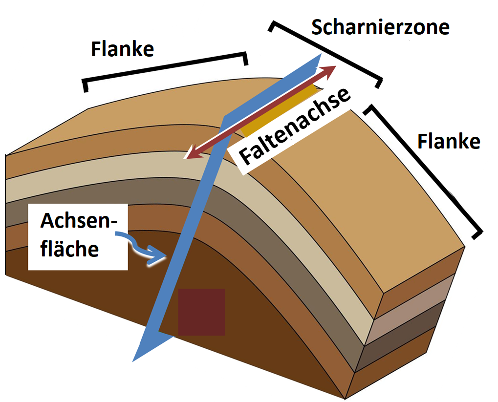 Antiforme Falte mit entsprechender Terminologie